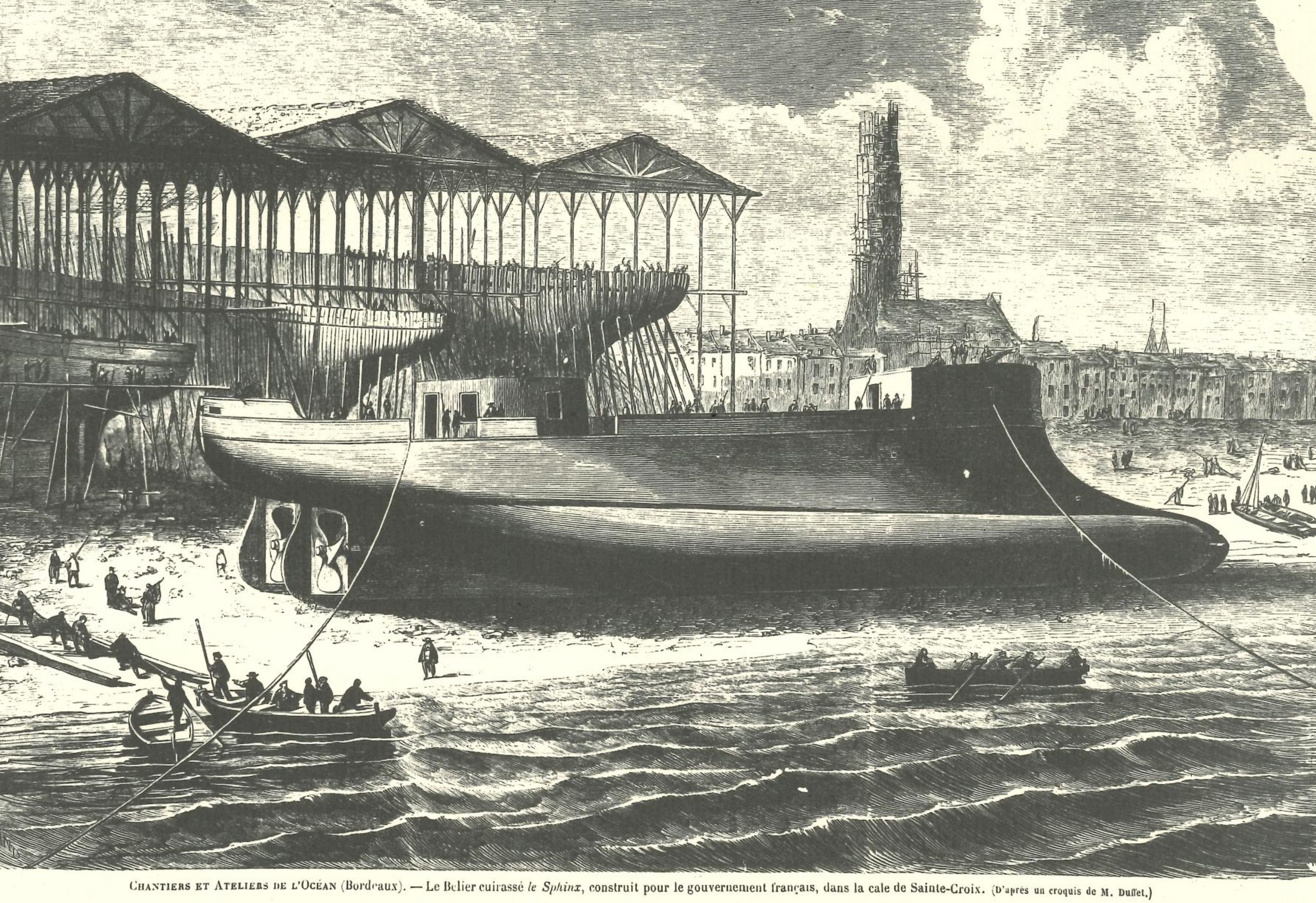 Construction du Bélier-cuirassé le Sphinx par les Chantiers et Ateliers de l'Océan de Lucien Arman dans le cale Sainte-Croix à Bordeaux. Gravure de M. Duffet pour le Monde illustré, 1864.